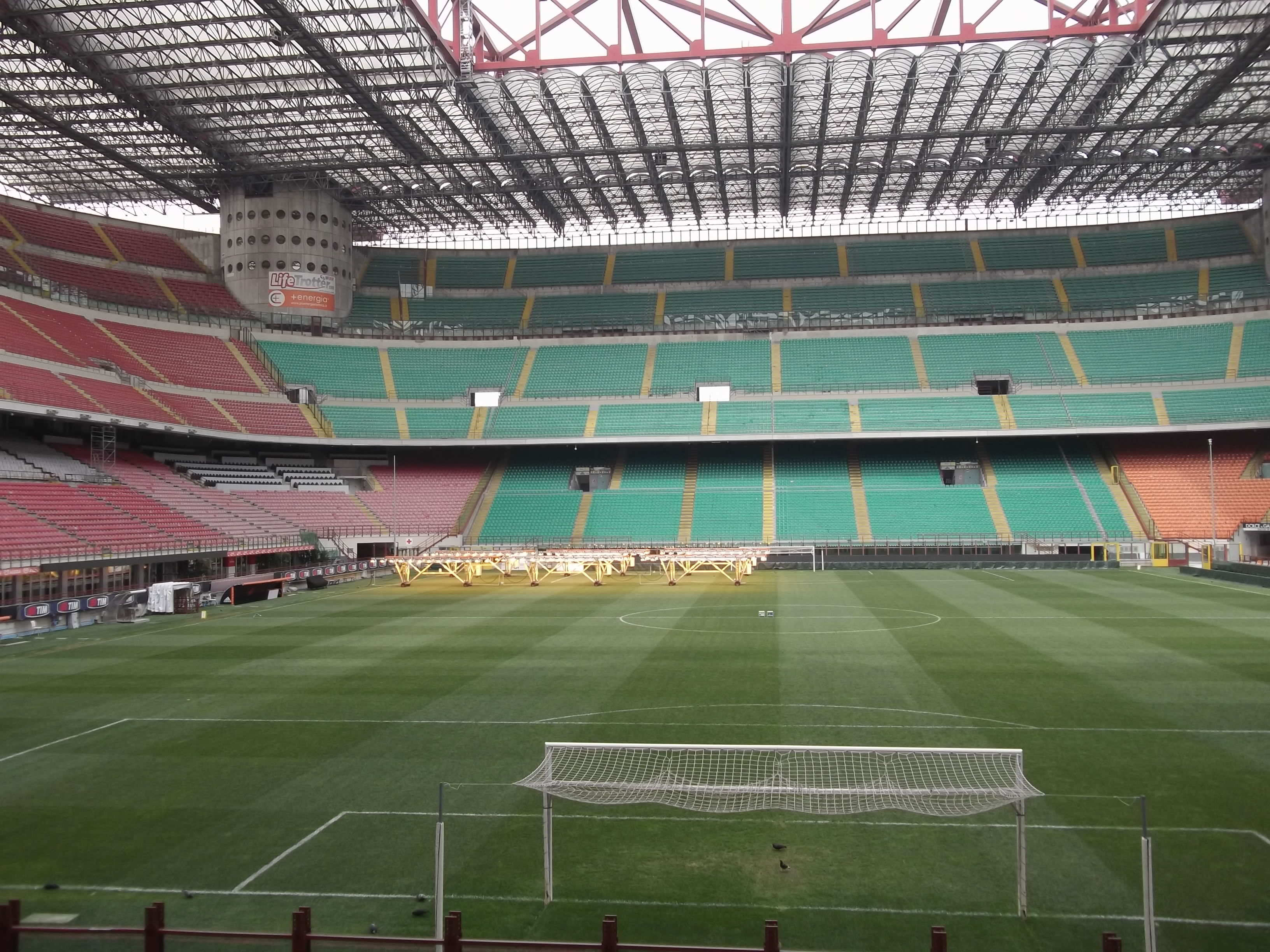 San Siro